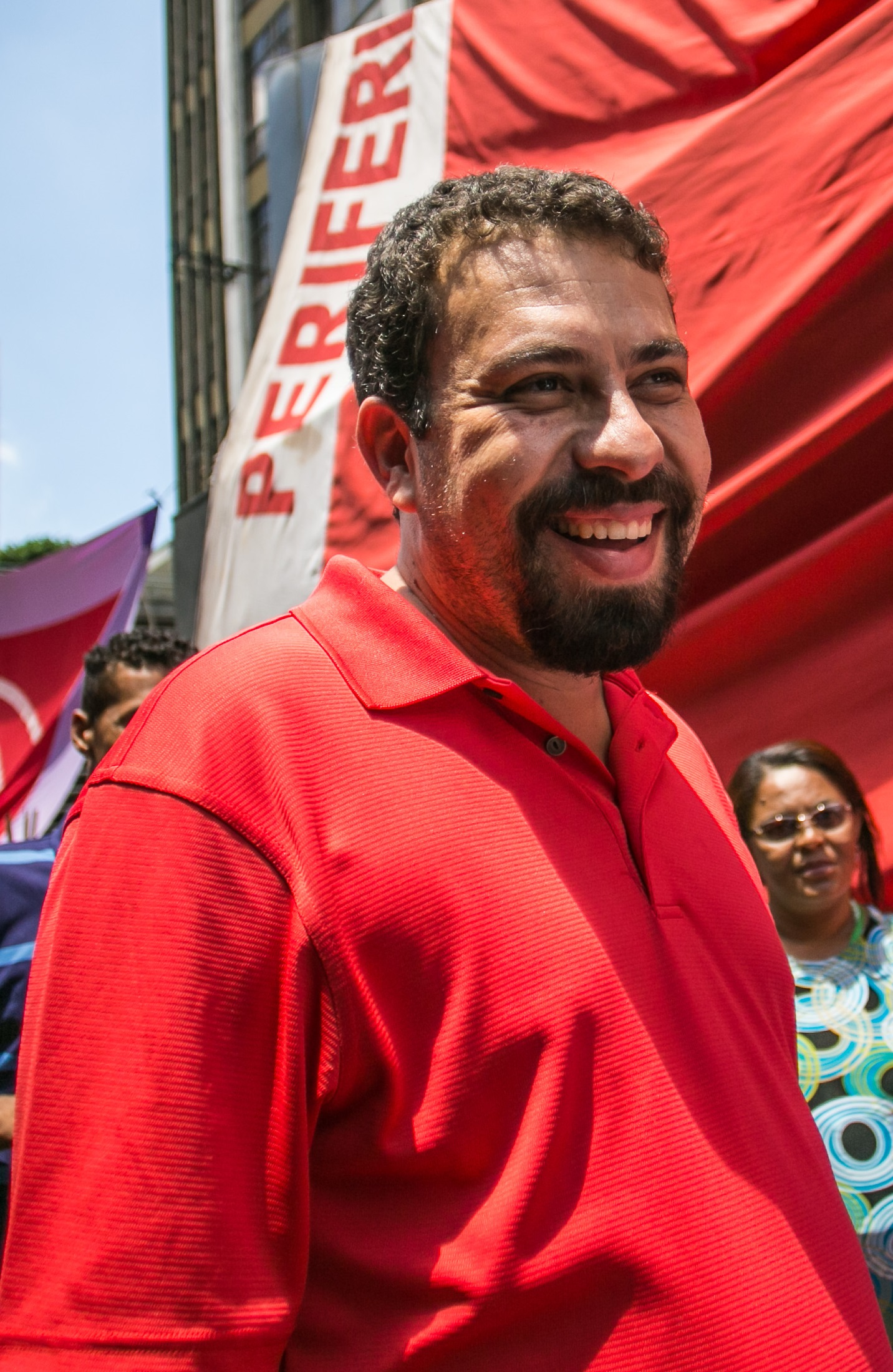 MTST• Ocupa Paulista • 17/02/2017 • São Paulo SP